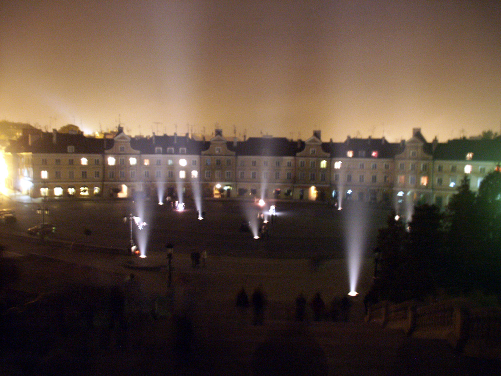 Plac Zamkowy (Lublin) podczas misterium "Poemat o Miejscu"